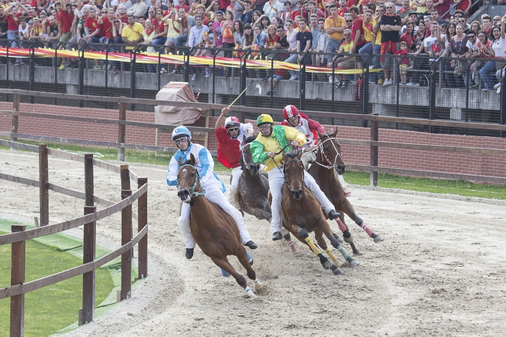 Corsa ippica del Palio di Legnano 2015